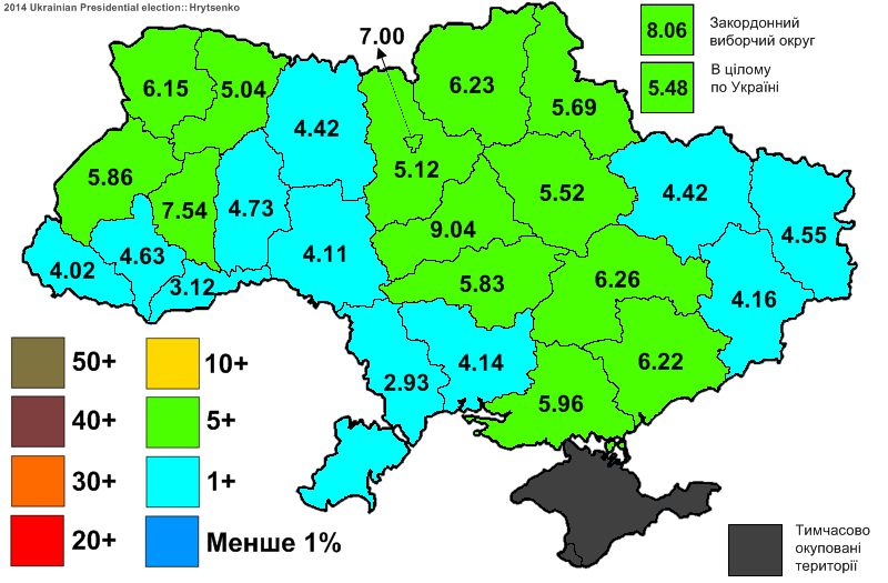 Електоральна підтримка Гриценка Анатолія Степановича на виборах Президента України 2014.